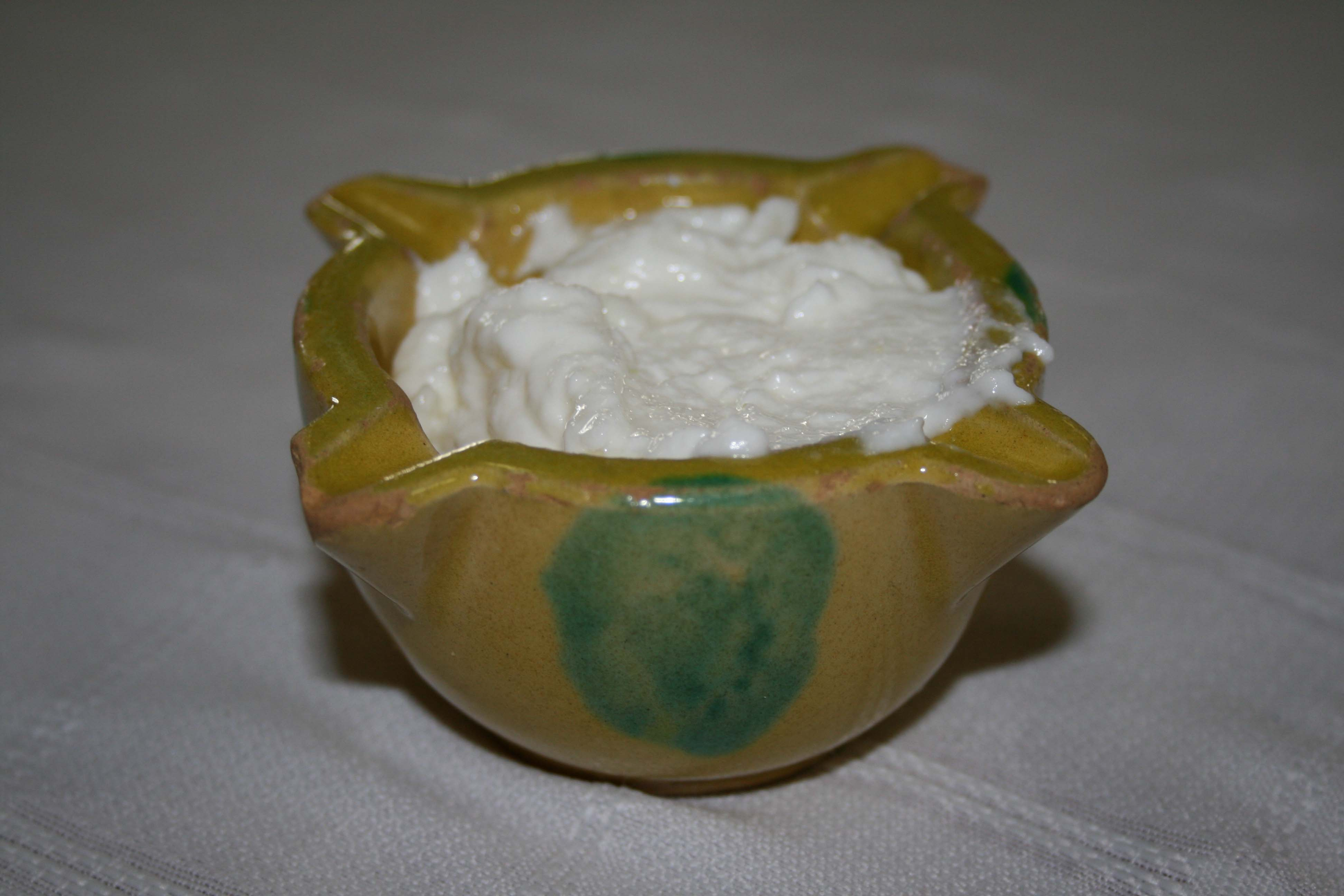 Salsa Alioli - Empleada como acompañamiento de una paella en los arrozales del Delta del Ebro. Detalle